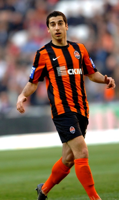 В матче против Фк Металлист